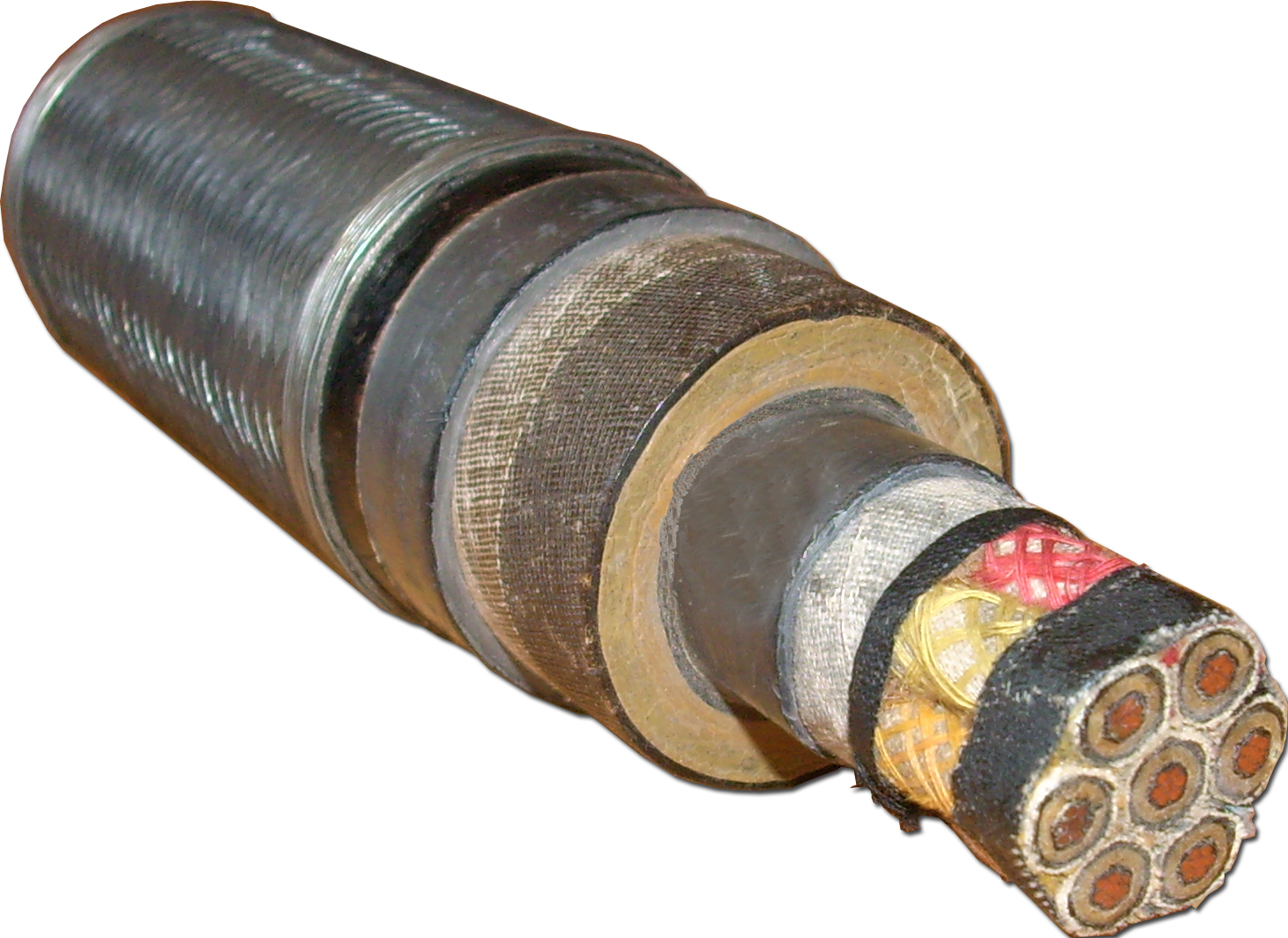 Kommunikationskabel (Seekabel) im Detail